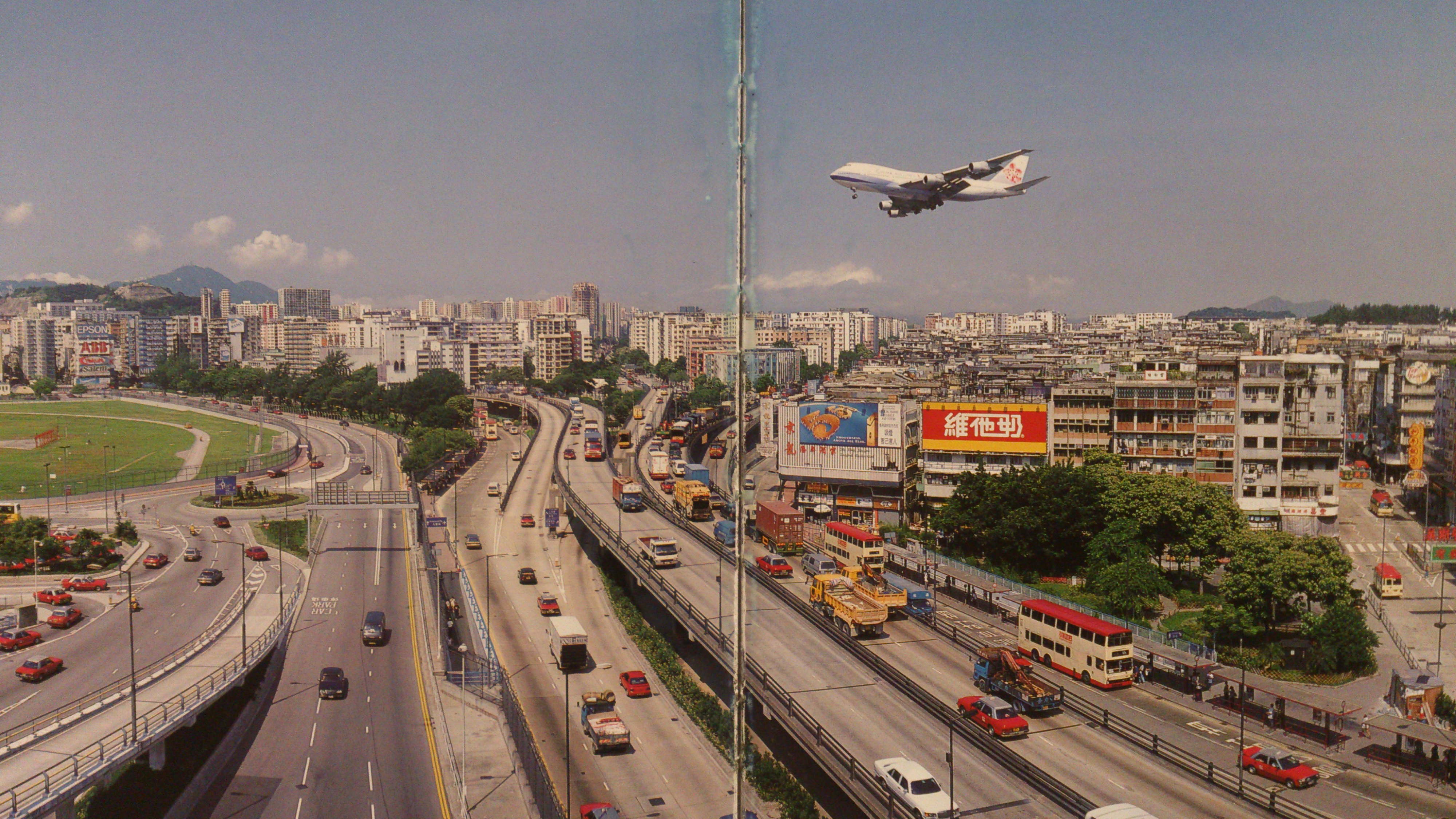 Kowloon Tsai, Hong Kong